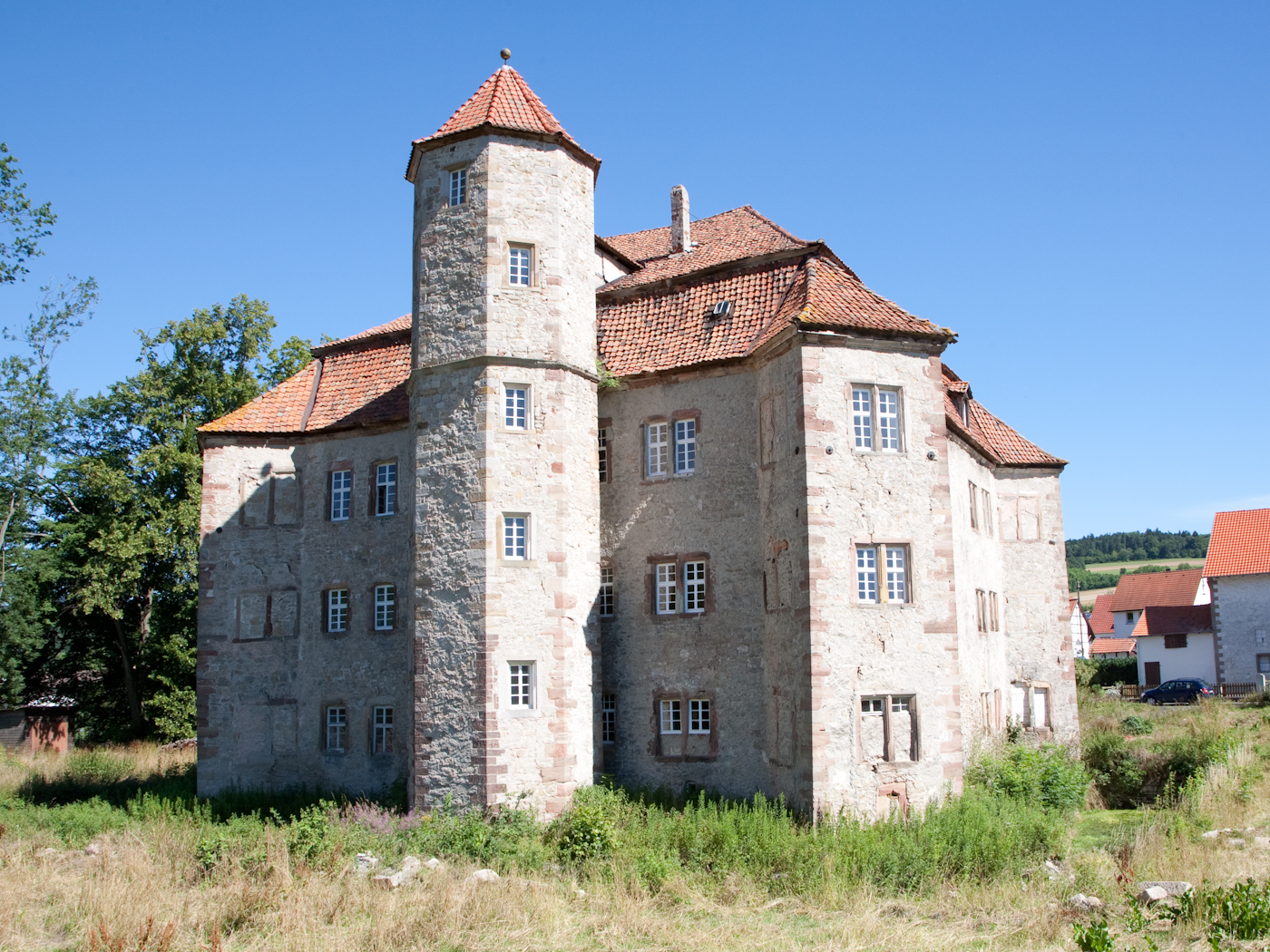 ehemaliges Wasserschloss in Netra